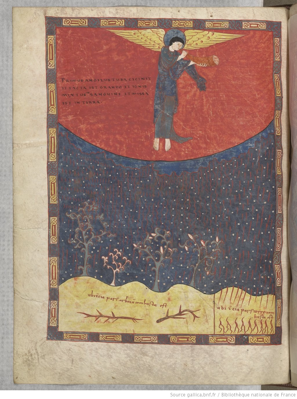 Eluminure Apocalypse de Saint Sever. Folio 137v of the Apocalypse of St. Sever (St. Sever Beatus), The rain of fire and blood